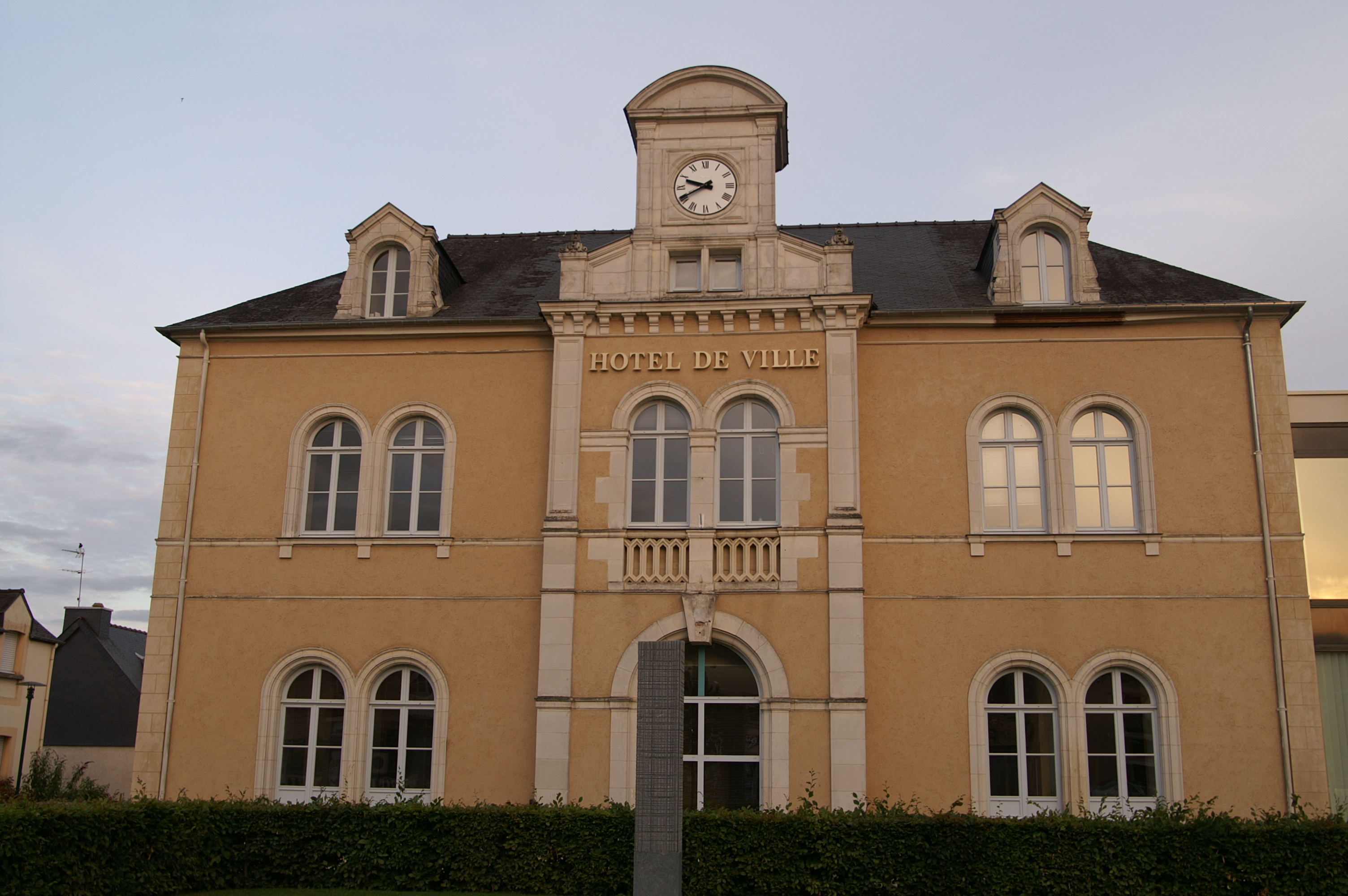 Hôtel de ville de Mordelles. Architecte : Jacques Mellet. 1852.